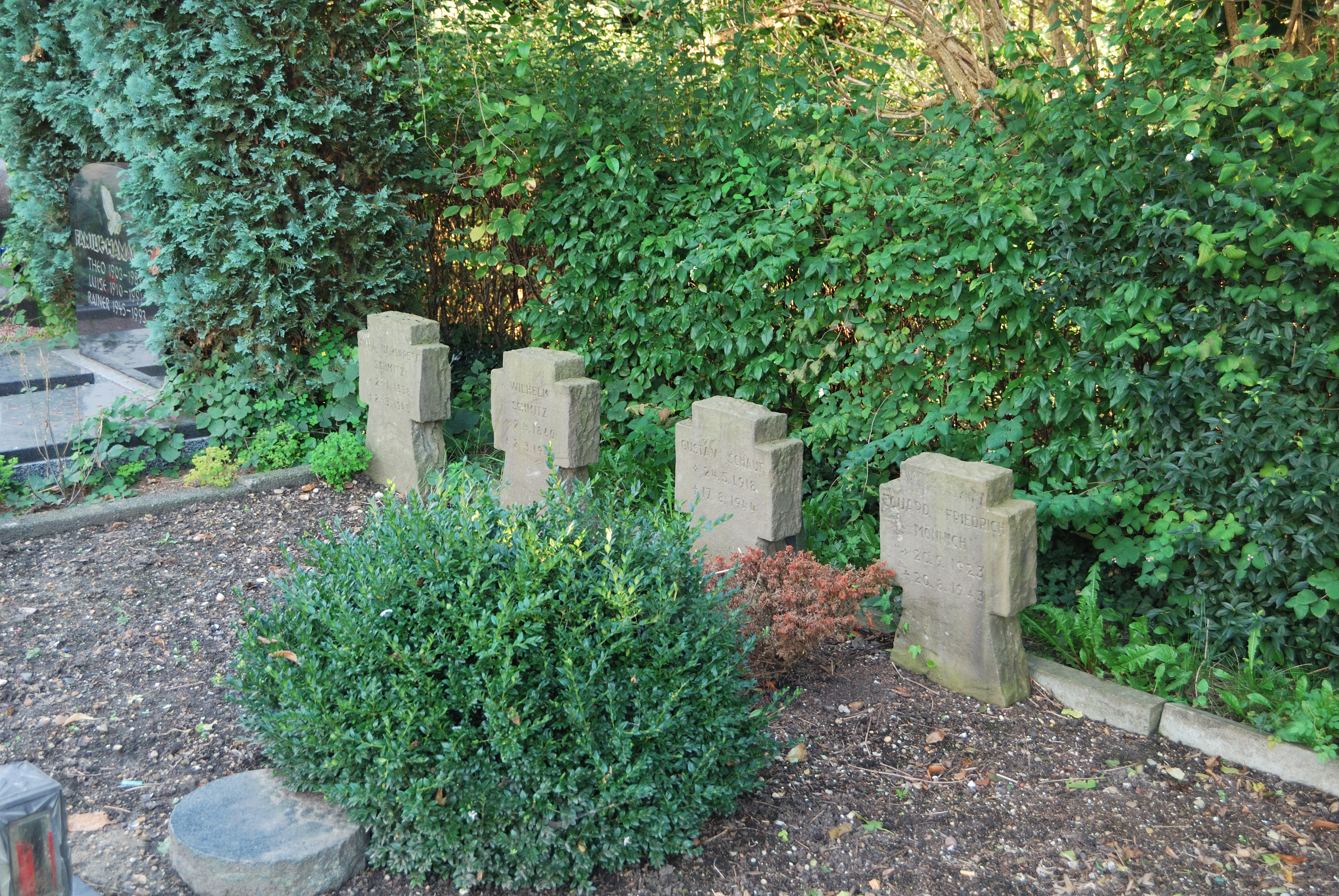 Friedhofstraße, Denkmalnummer 234